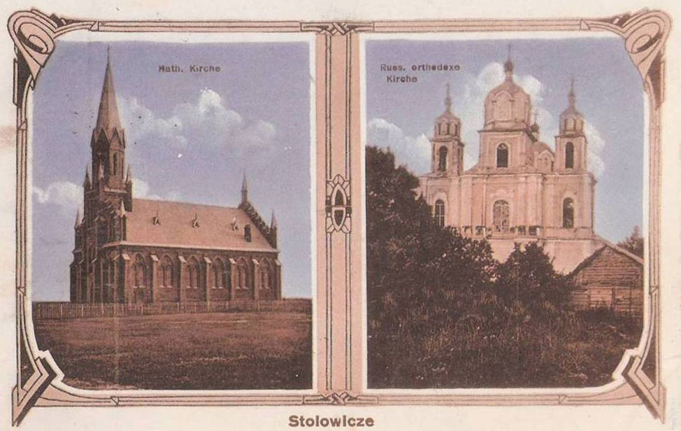 Беларуская (тарашкевіца): Сталавічы (Stałavičy). Зборная паштоўка